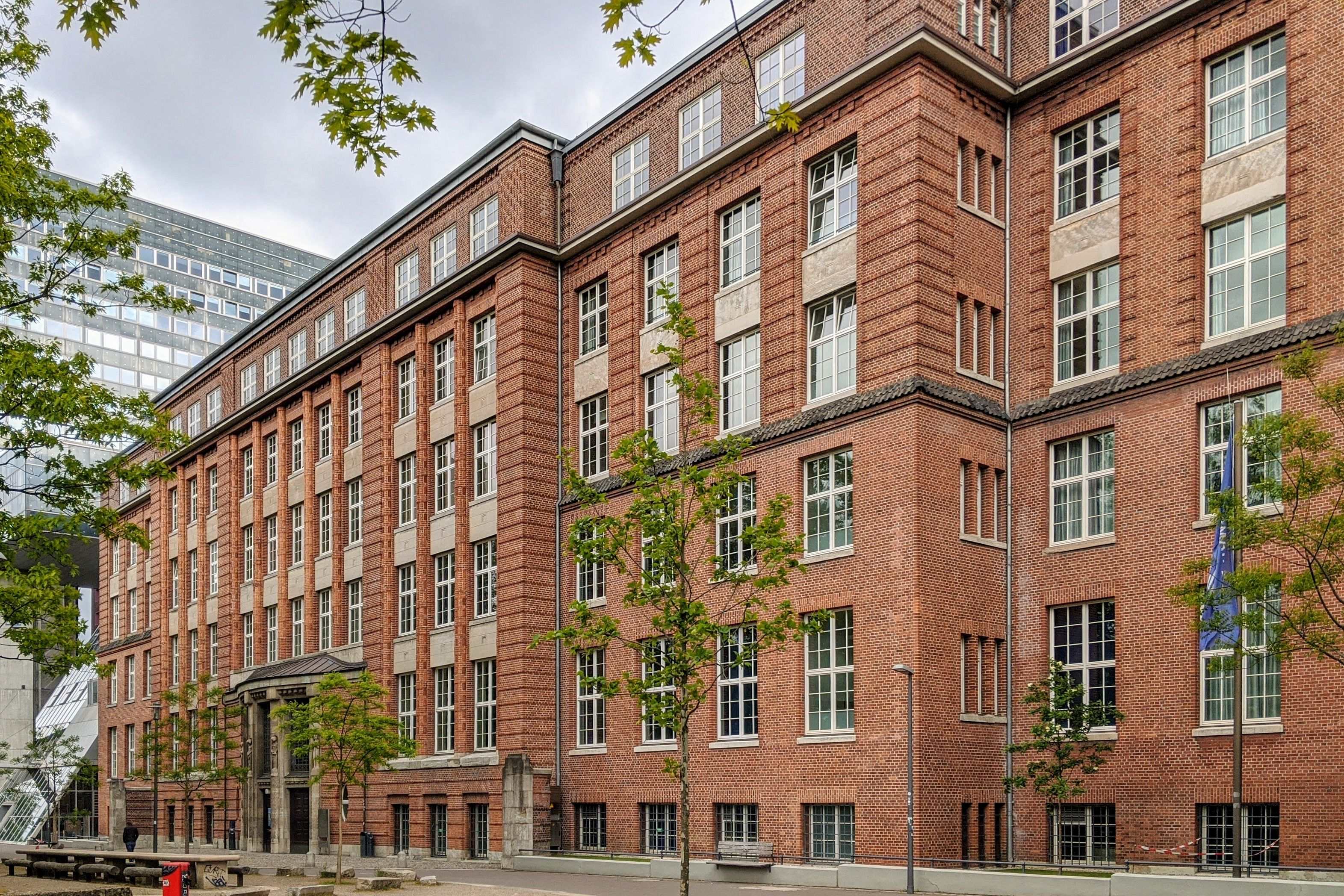 Hauptgebäude der HAW Hamburg, erbaut 1911-1914 von Fritz Schumacher